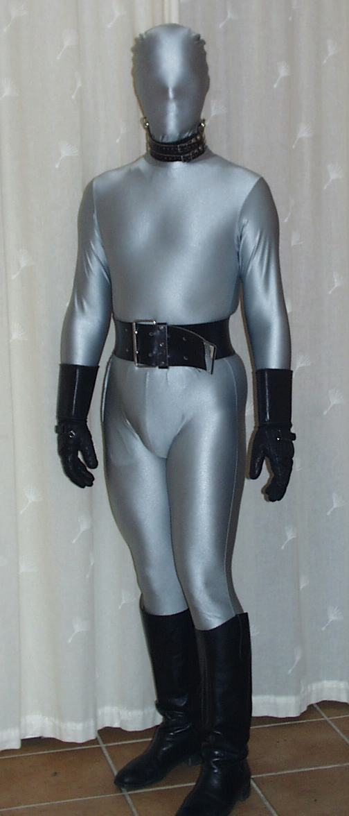 zentai silver spandex